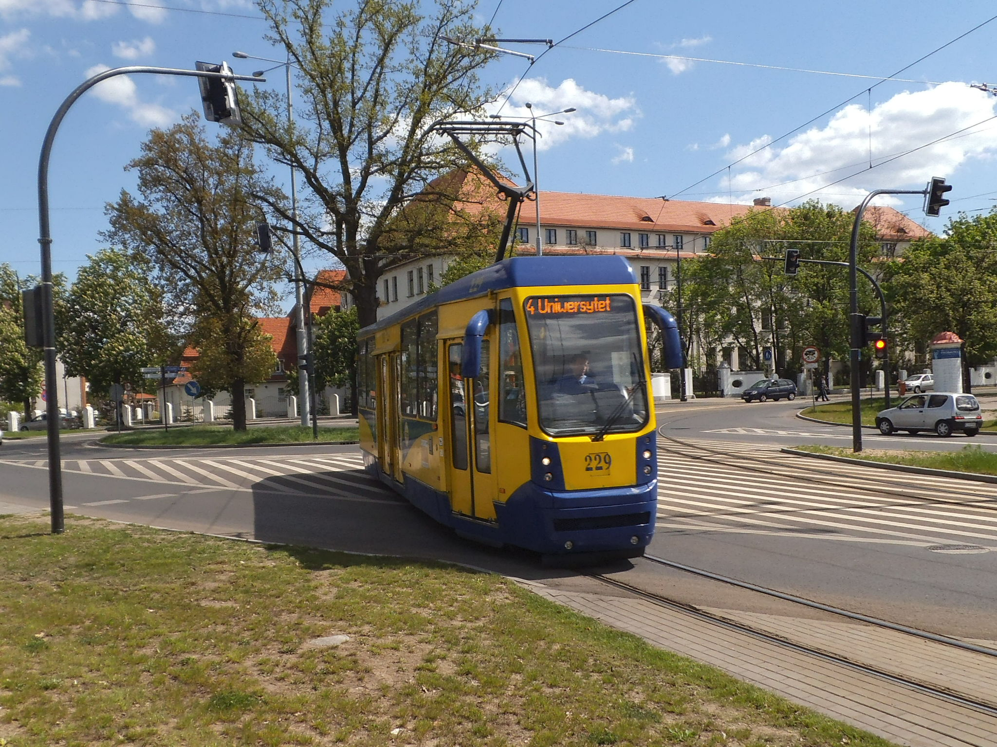 Toruński tramwaj